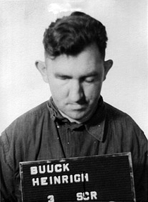 Foto des Angeklagten Heinrich Buuck, SS-Angehöriger im Buchenwalder Außenlager Sonneberg, im Case No. 000-Buchenwald-9 (US vs. Heinrich Buuck) Tried 14 Oct. 47, zum Tode verurteilt. Später in 15 Jahre Haftstrafe umgewandelt, jedoch wurde ihm im Überprüfungsverfahren Befehlsnotstand zugebilligt, sodass er 1954 auf Bewährung aus Landsberg entlassen wurde.